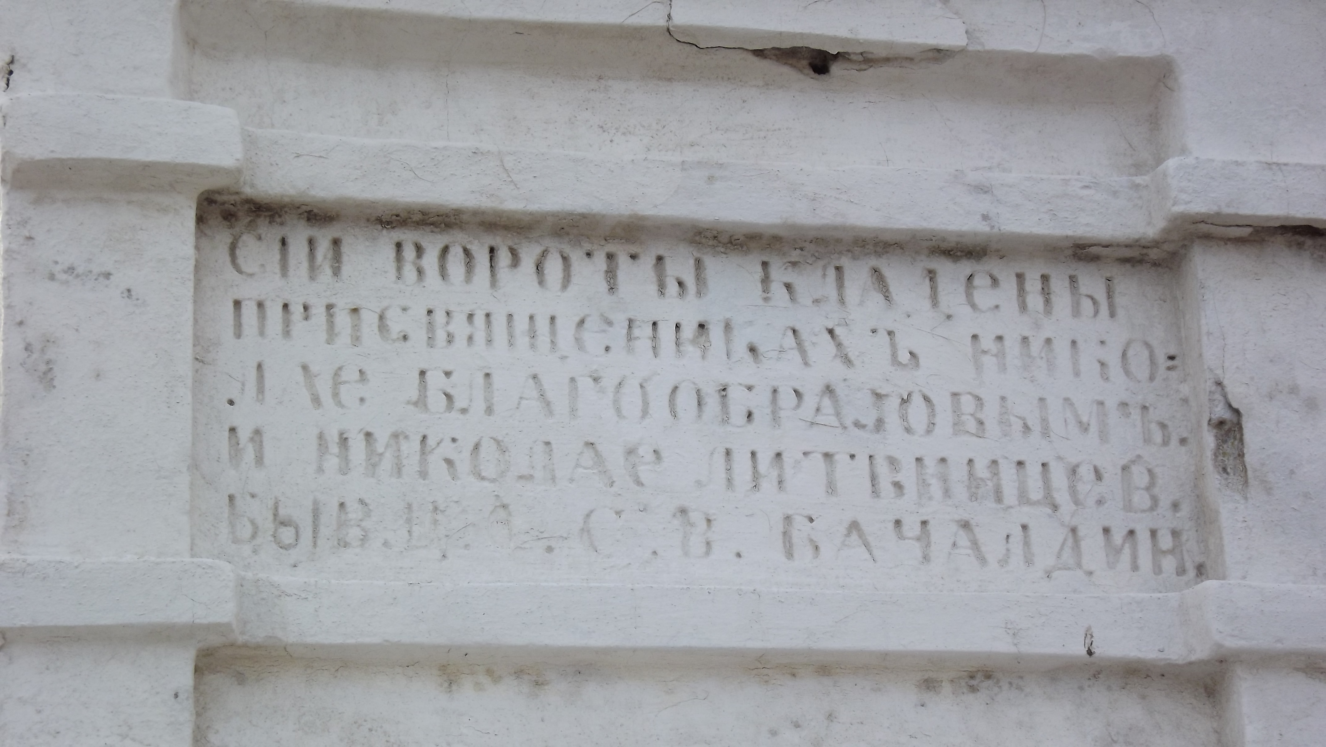 Благовещенская церковь (Республика Бурятия, Бабушкин, село Кудара)